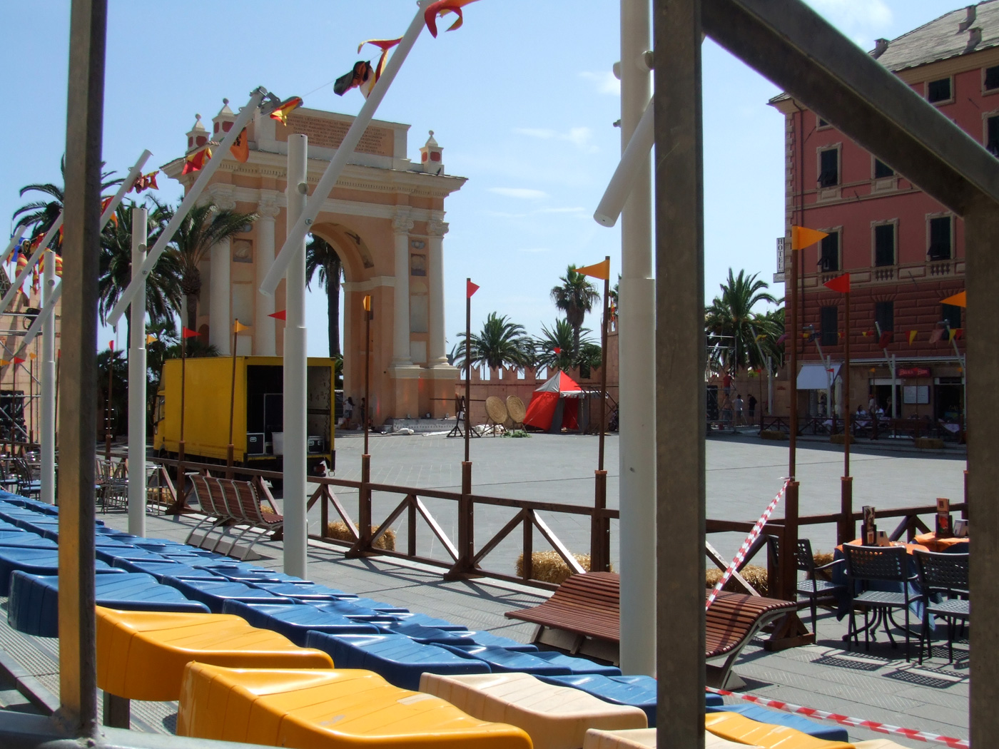 Préparatifs du Palio delle Compagne sur la place Victor-Emmanuel II à Finale Ligure